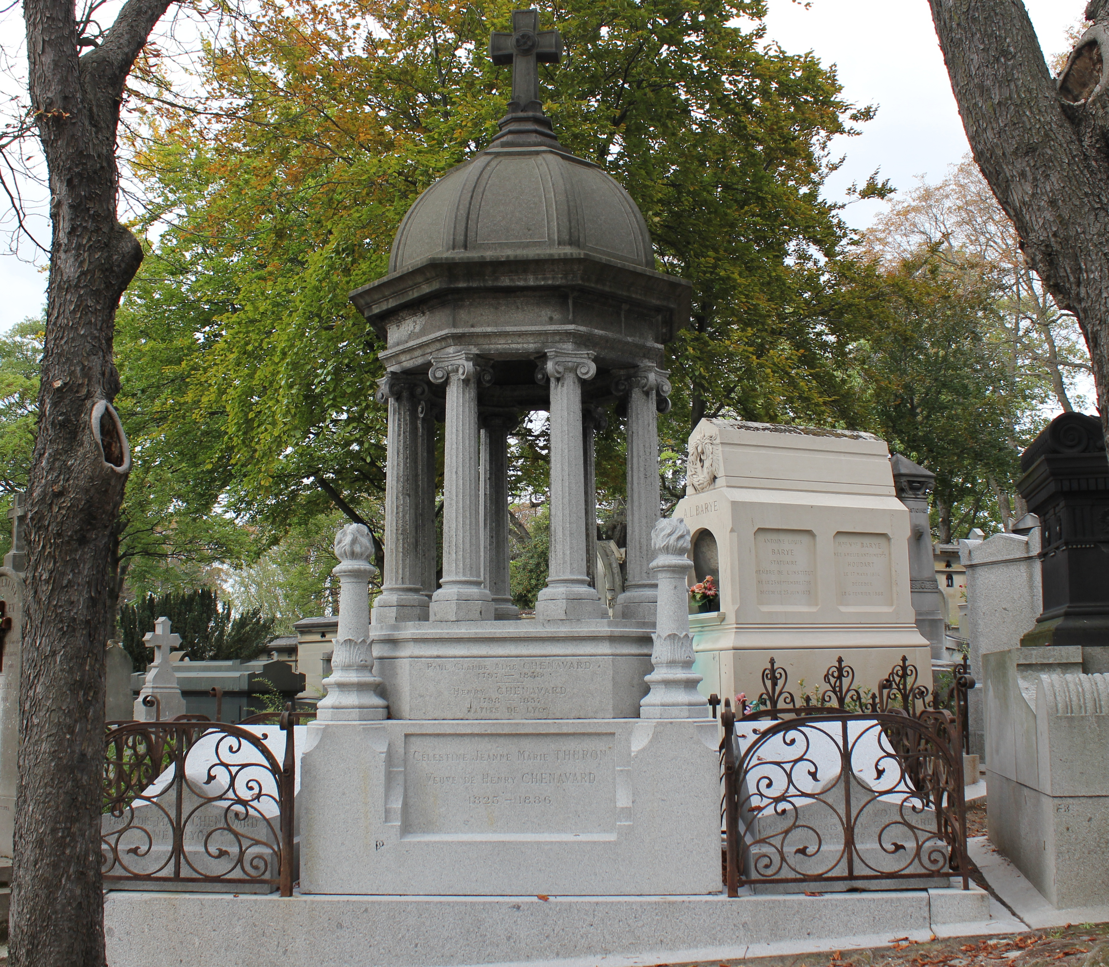 Mausolée orné d'un vase en bronze. face avant